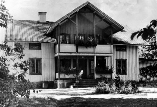 Viby gårds huvudbyggnad före 1955.